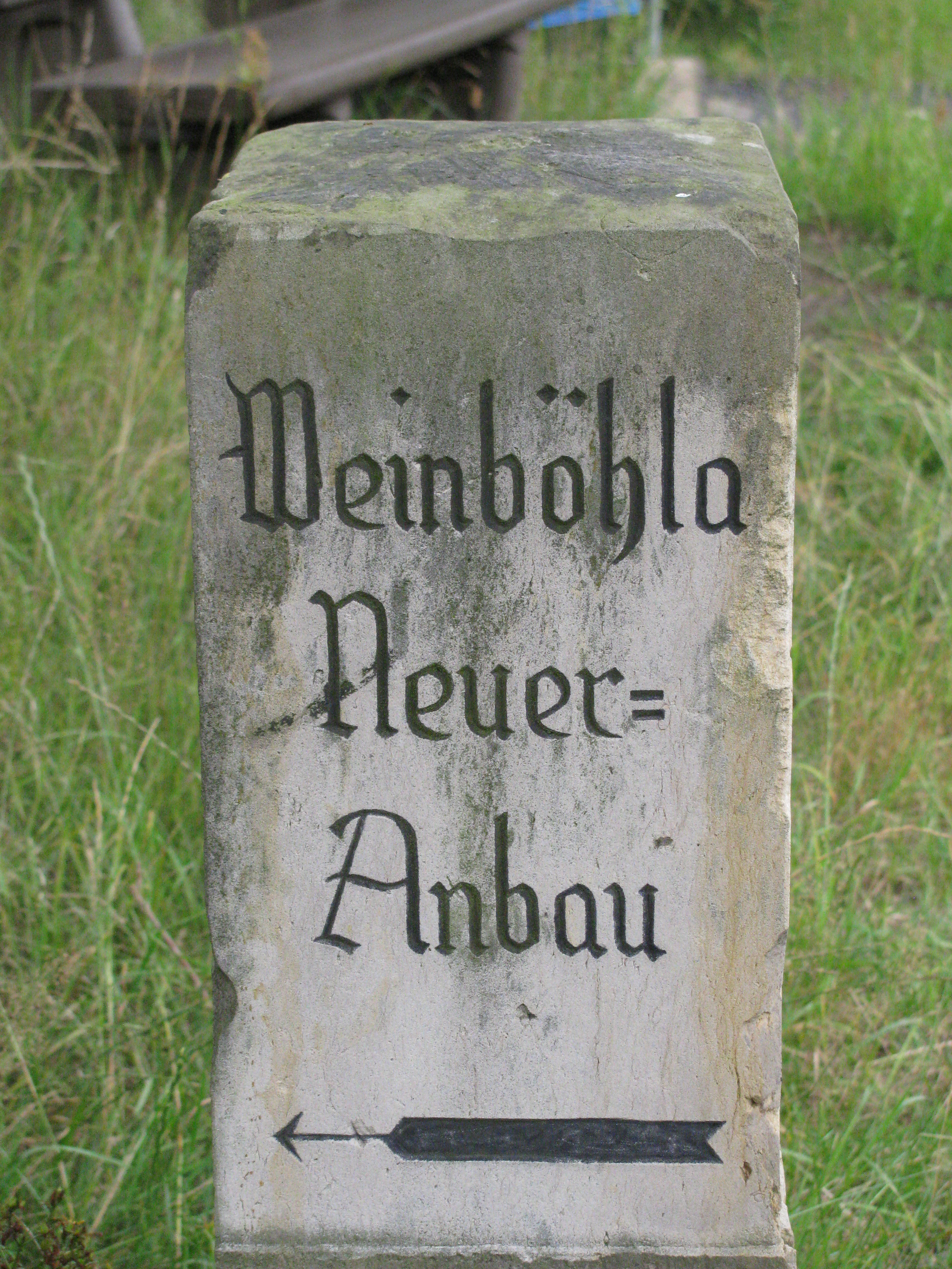 Wegweiser nach Neuer Anbau, Ortsteil von Weinböhla. Wegweiser befindet sich am Forsthaus Kreyern, Coswig, Landkreis Meißen, Sachsen